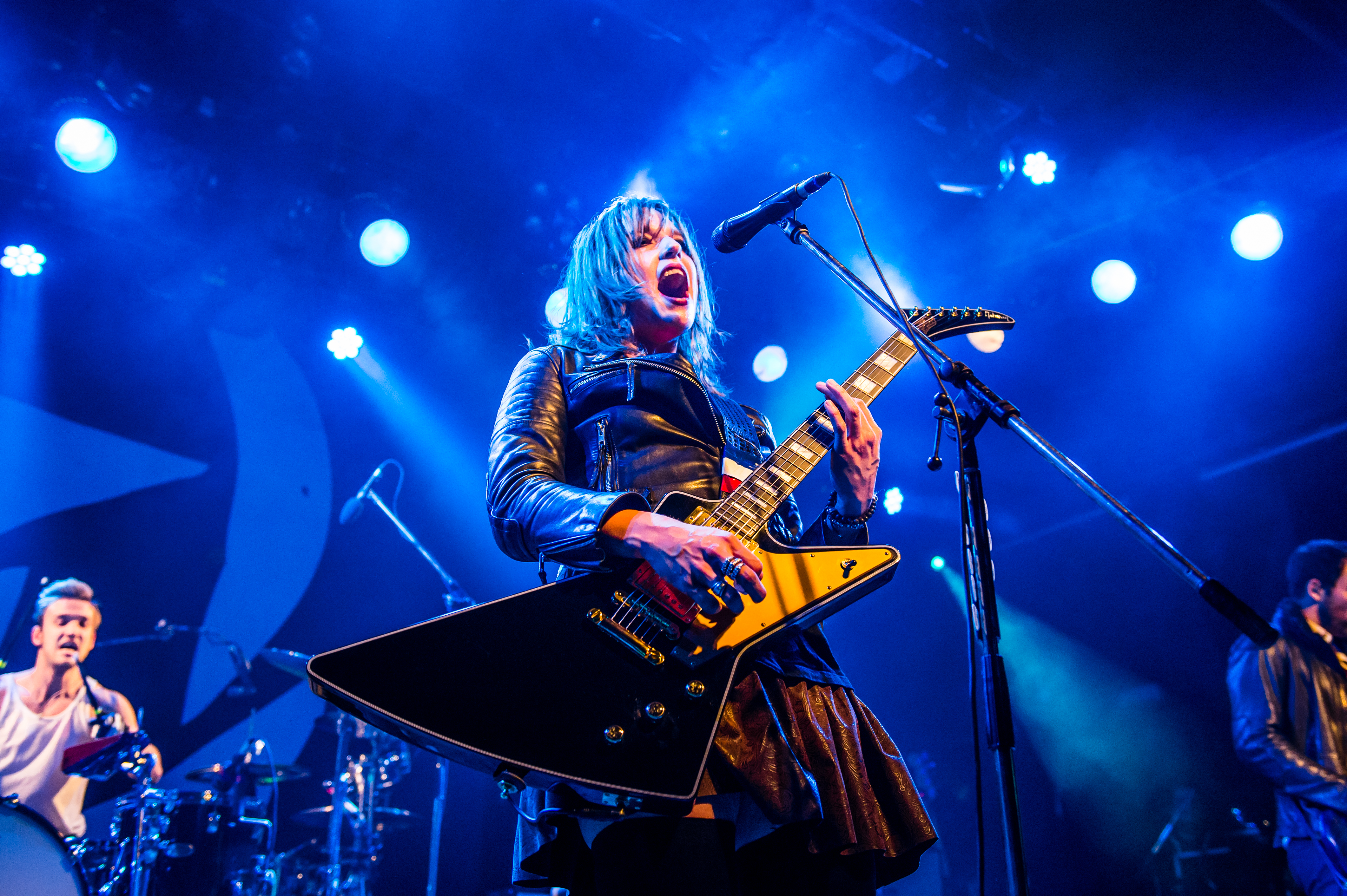 'Halestorm Into the Wild Life Tour - Bochum Zeche'